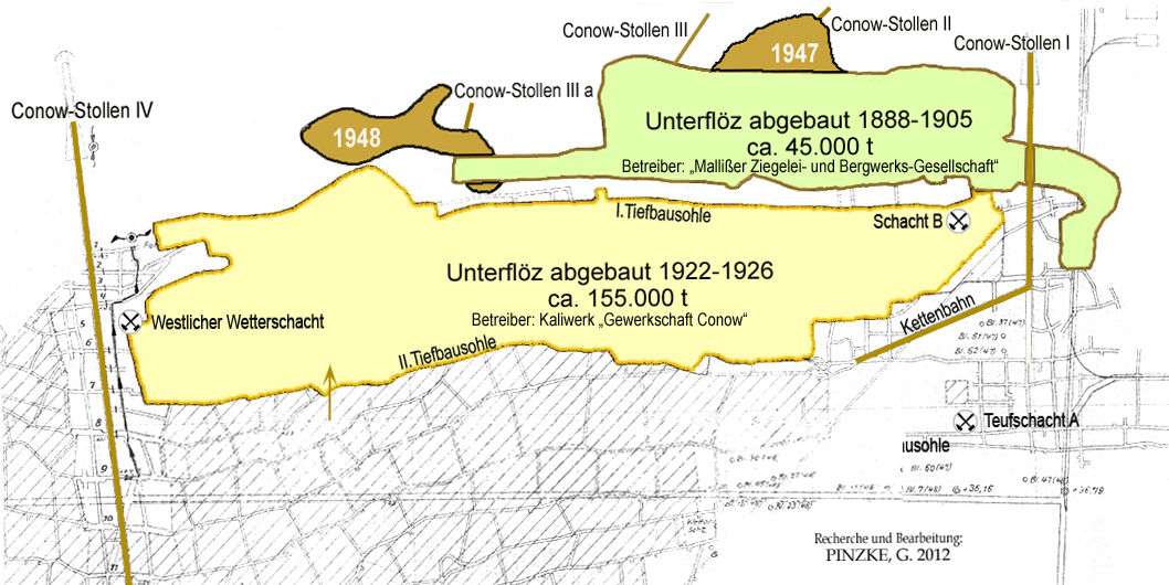 Durch die Gewerkschaft Conow 1922 bis 1926 abgebautes Unterflöz